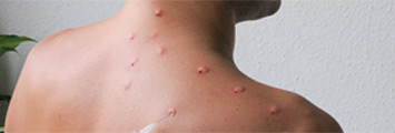 Hautquaddeln in der Segmentneuraltherapie